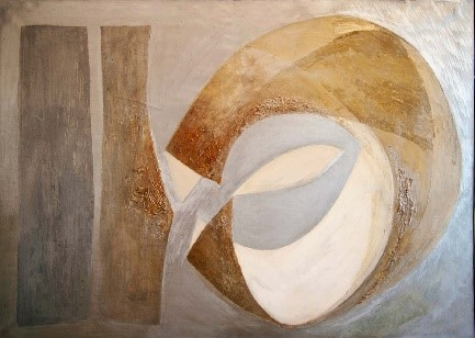 ALAKULÁS (100x140 cm, olaj, vászon) baloldalon álló hasáb forma, az élet lehetőségét rejtő élettelen jelzése, melyből a mellette levő formából elmozdult, leszakadt önállóan alakuló nagy forma középső része 2. kép a központi kép felé irányul.